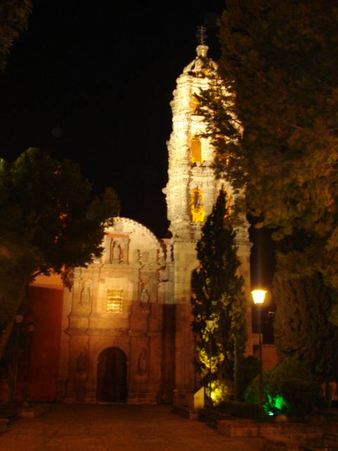 Iglesia de San Agustin en San Luis Potosi.